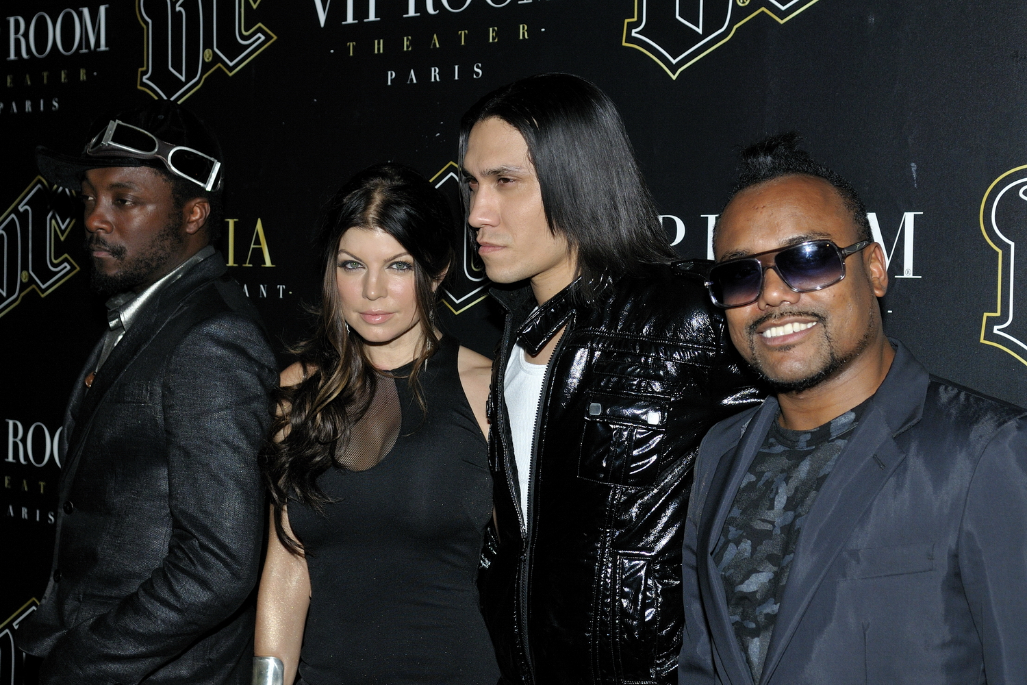 Les Black Eyed Peas en concert privé au VIP Room Paris. avec will.i.am, apl.de.ap, Taboo et Fergie Vous pourrez trouver une sélection de photos à acheter ici : Jingoo